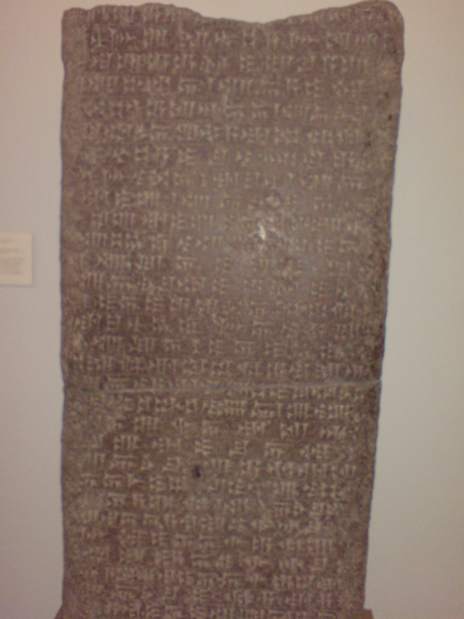 Berlin'deki Pergamon Müzesi'nde bulunan Hitit çivi yazısı örneği.